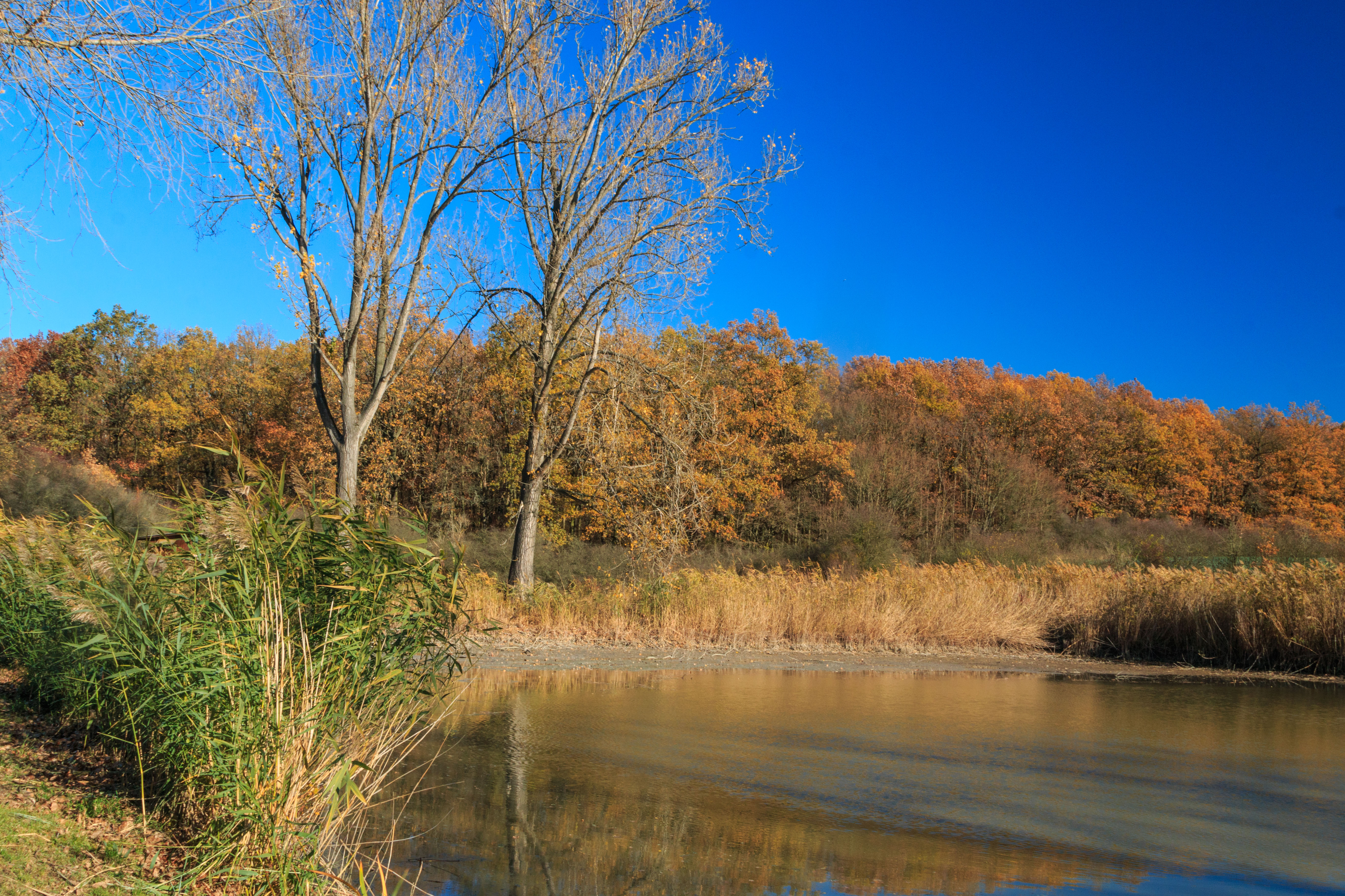 Dolní rybník u Rožďalovic Project: Vodstvo.